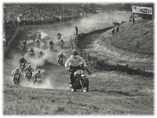 Leslie Archer fører an i finalen ved det europæiske mesterskab i motocross på Volk Mølle banen.